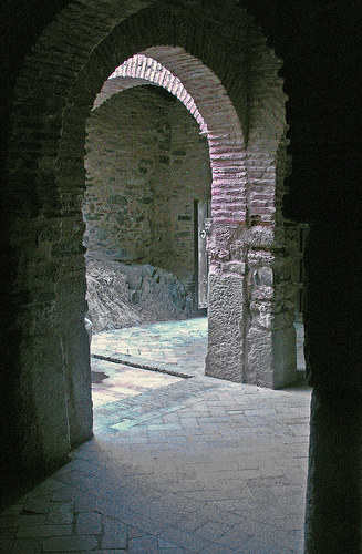 Vue intérieure de la Mosquée d'Almonaster la Real